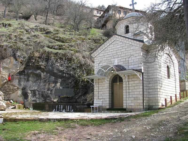 Св. Недела во Малкоец